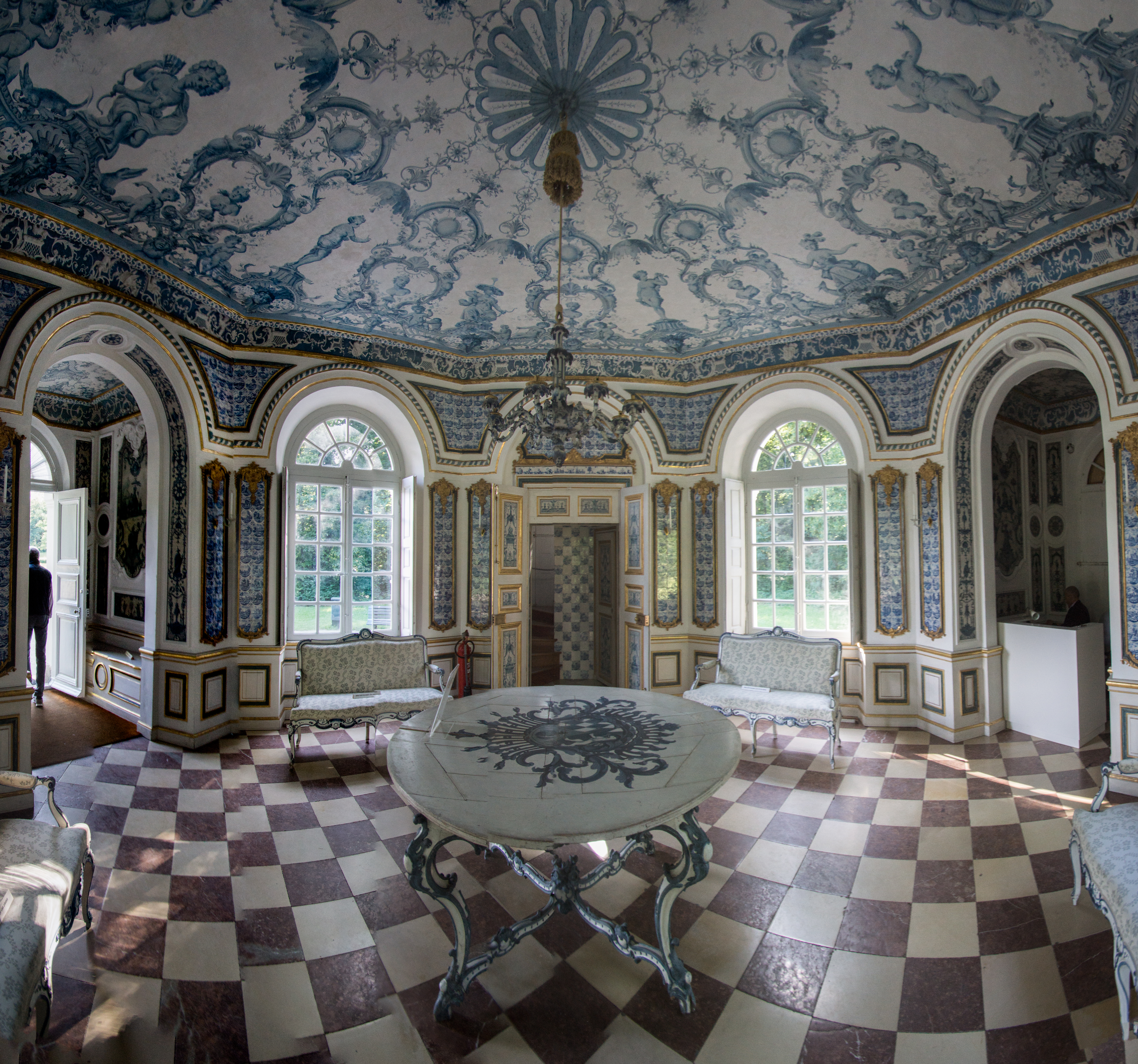 Interior de la Pagoda en el Palacio Nymphenburg